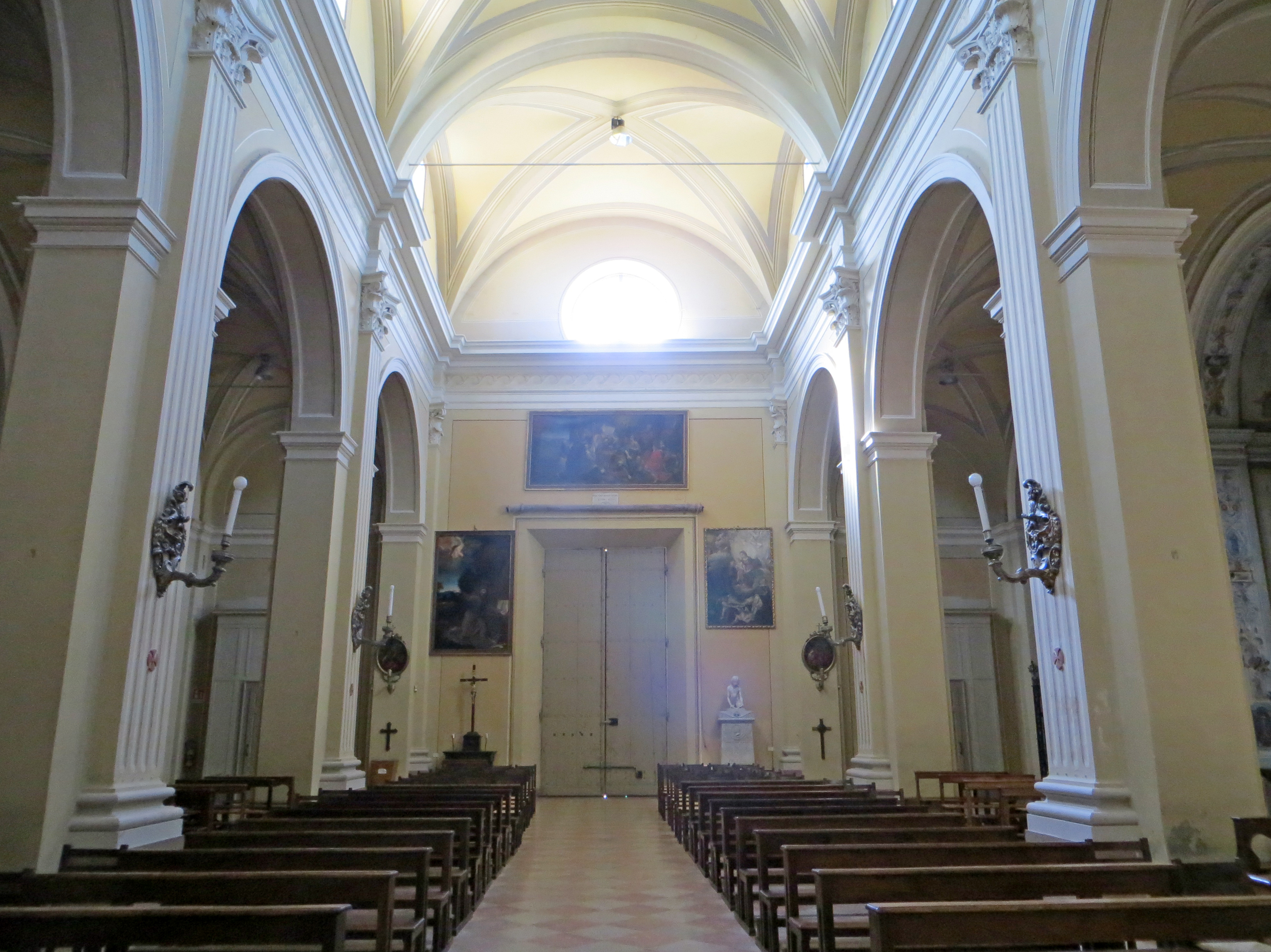 Duomo di Santa Margherita (Colorno) - navata centrale e controfacciata